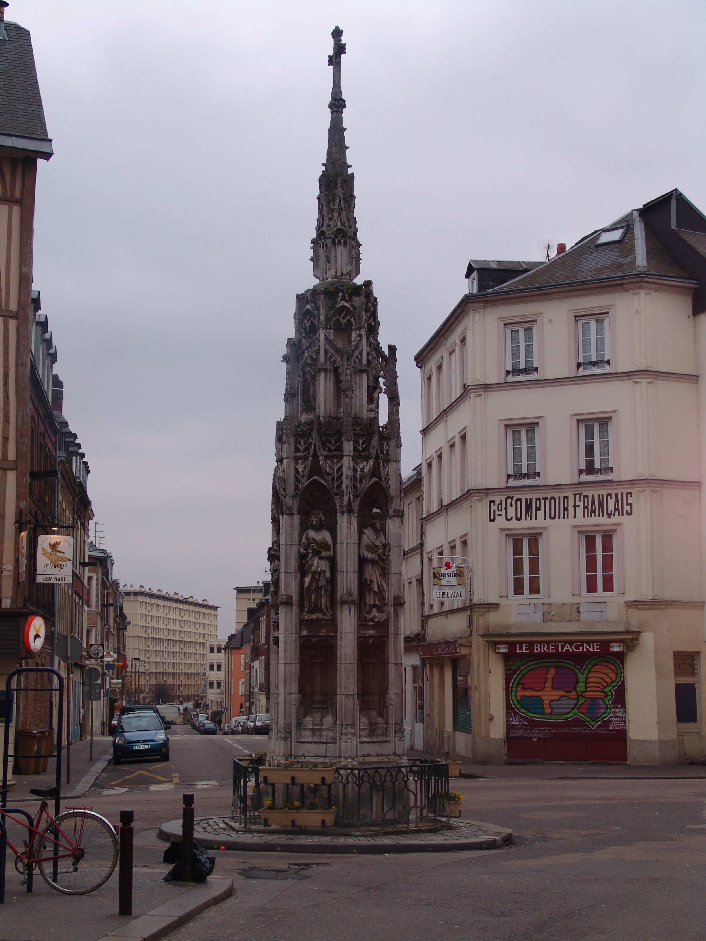 Fontaine de la Croix-de-pierre, dans le quartier de la Croix-de-pierre, à Rouen.